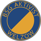 Logo der BSG Aktivist Welzow (1951-1990)